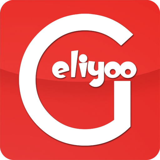 Geliyoo Search Engine , Geliyoo Arama Motoru